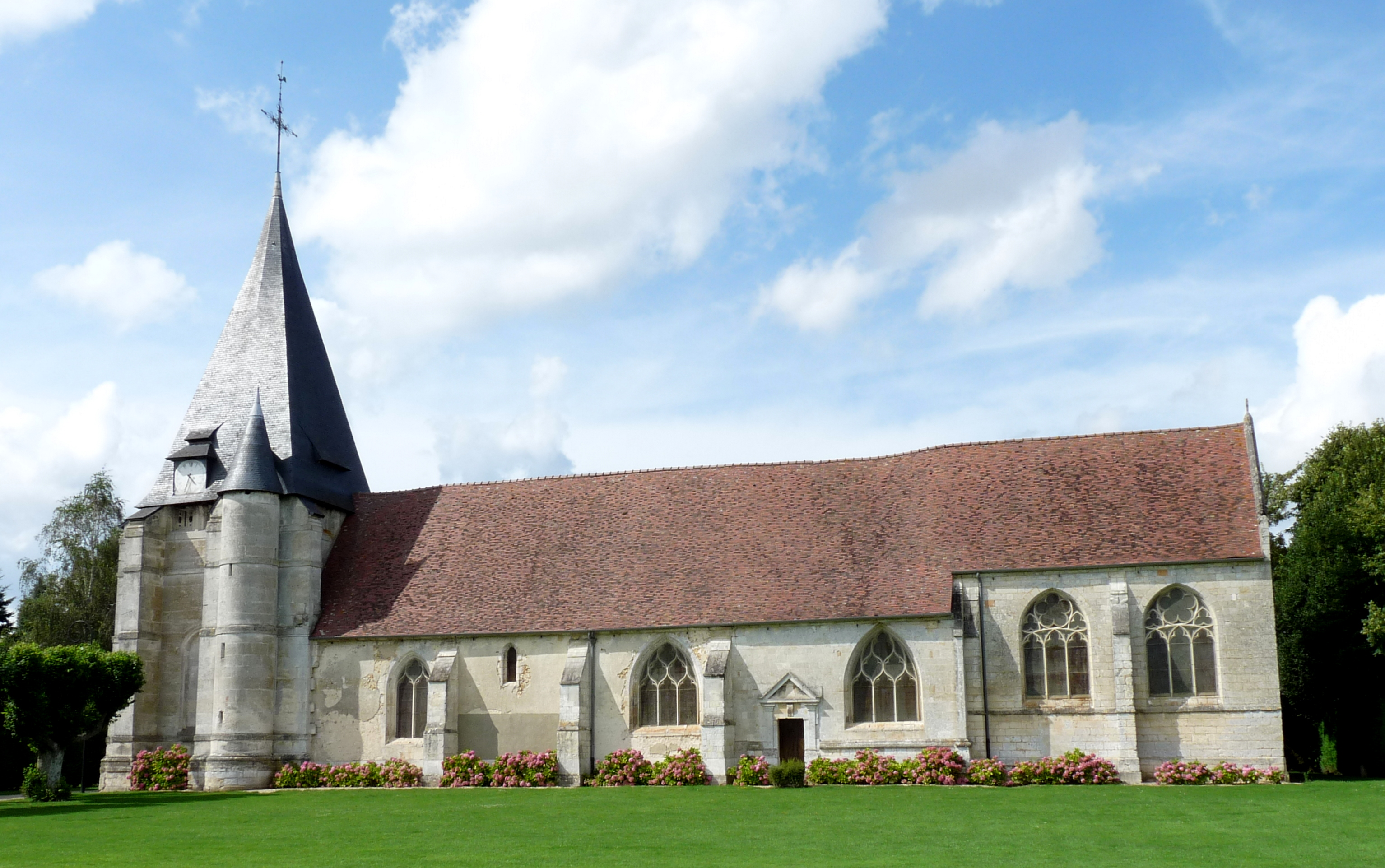 Église Notre-Dame de Goupillières .